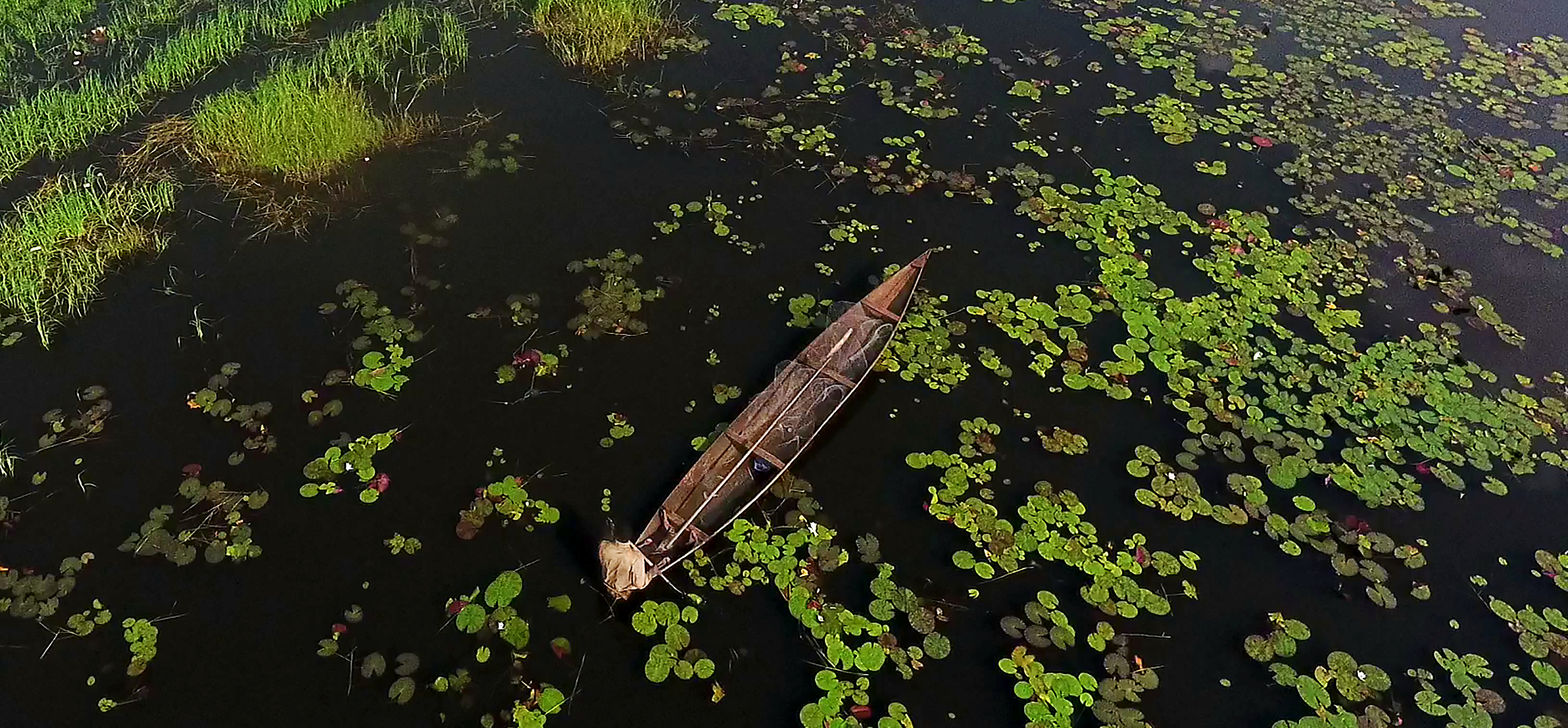 Moyen de transport des déplacés du nord-ouest installés aux rives du fleuve Noun dans le village bamedjin This is an image with the theme "Africa on the Move or Transport" from: Cameroon